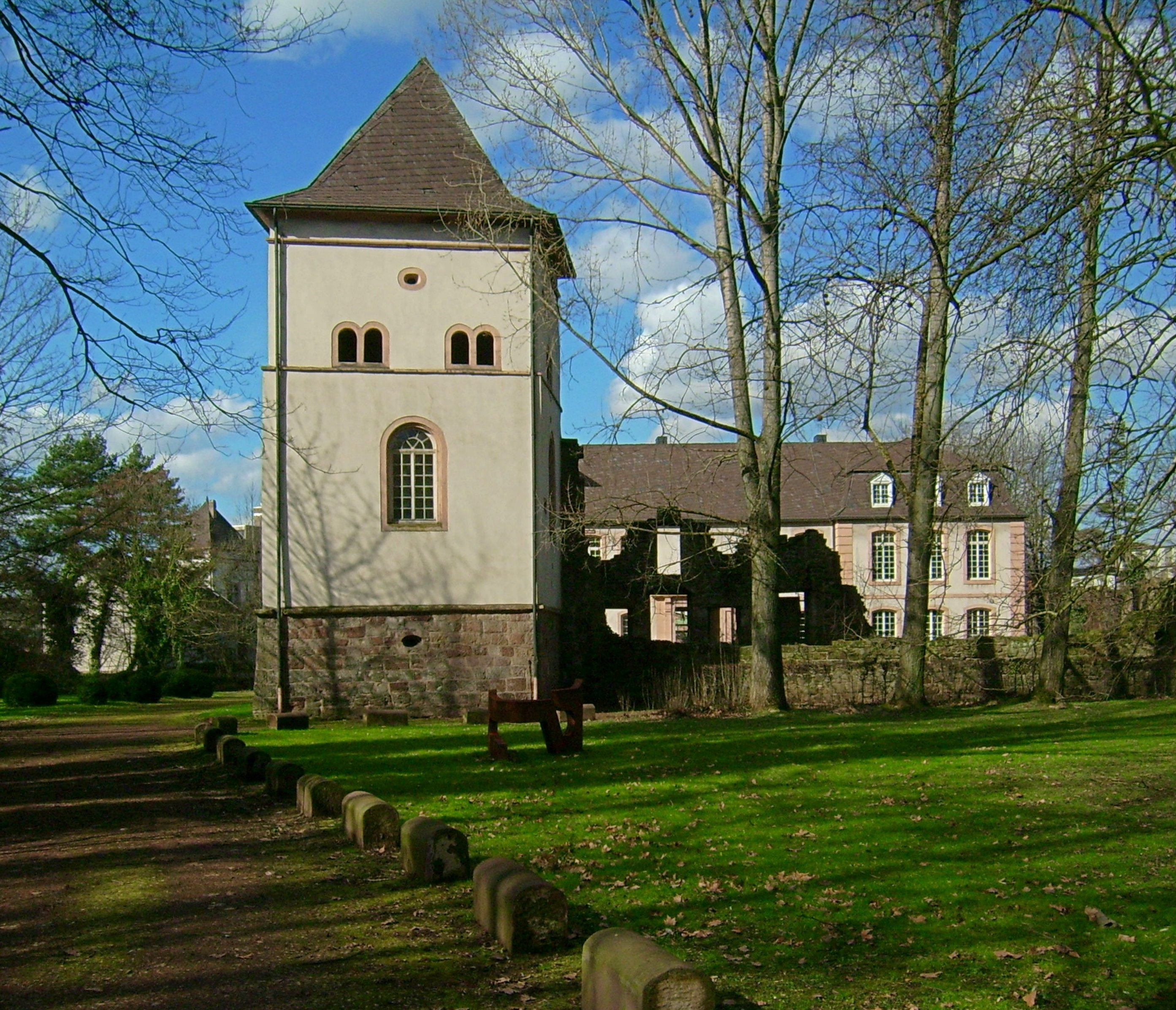 Altes Schloss in Dillingen/Saar, Rückseite